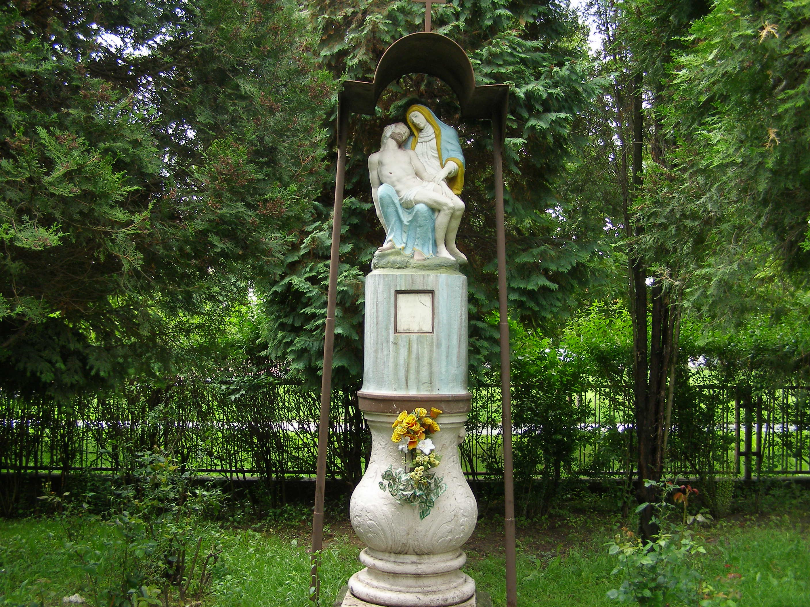 Pietà sculpture in front of Roman Catholic church Kostol Povýšenia svätého Kríža Daliborovo námestie 1, Petržalka, Bratislava, Slovakia